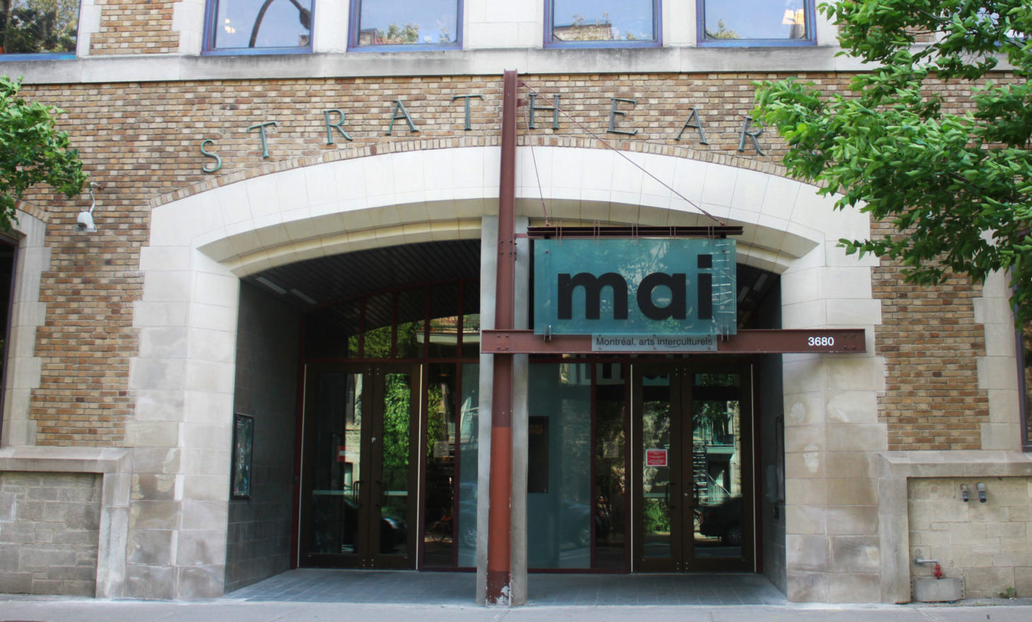 Entrée de l'édifice Strathearn. Montréal, arts interculturels